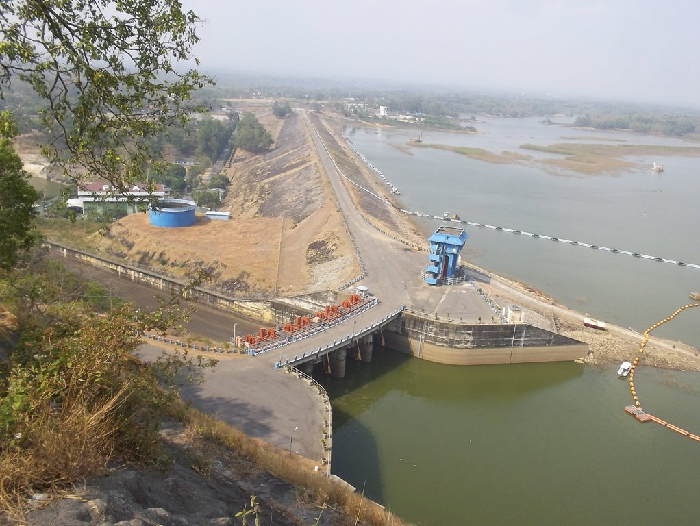 Jawa: Bendungan Jinis Lemah Urugan (katon dawa), ditambah sarana wangun limpasan banyu (spillway) lan Pembangkit Listrik